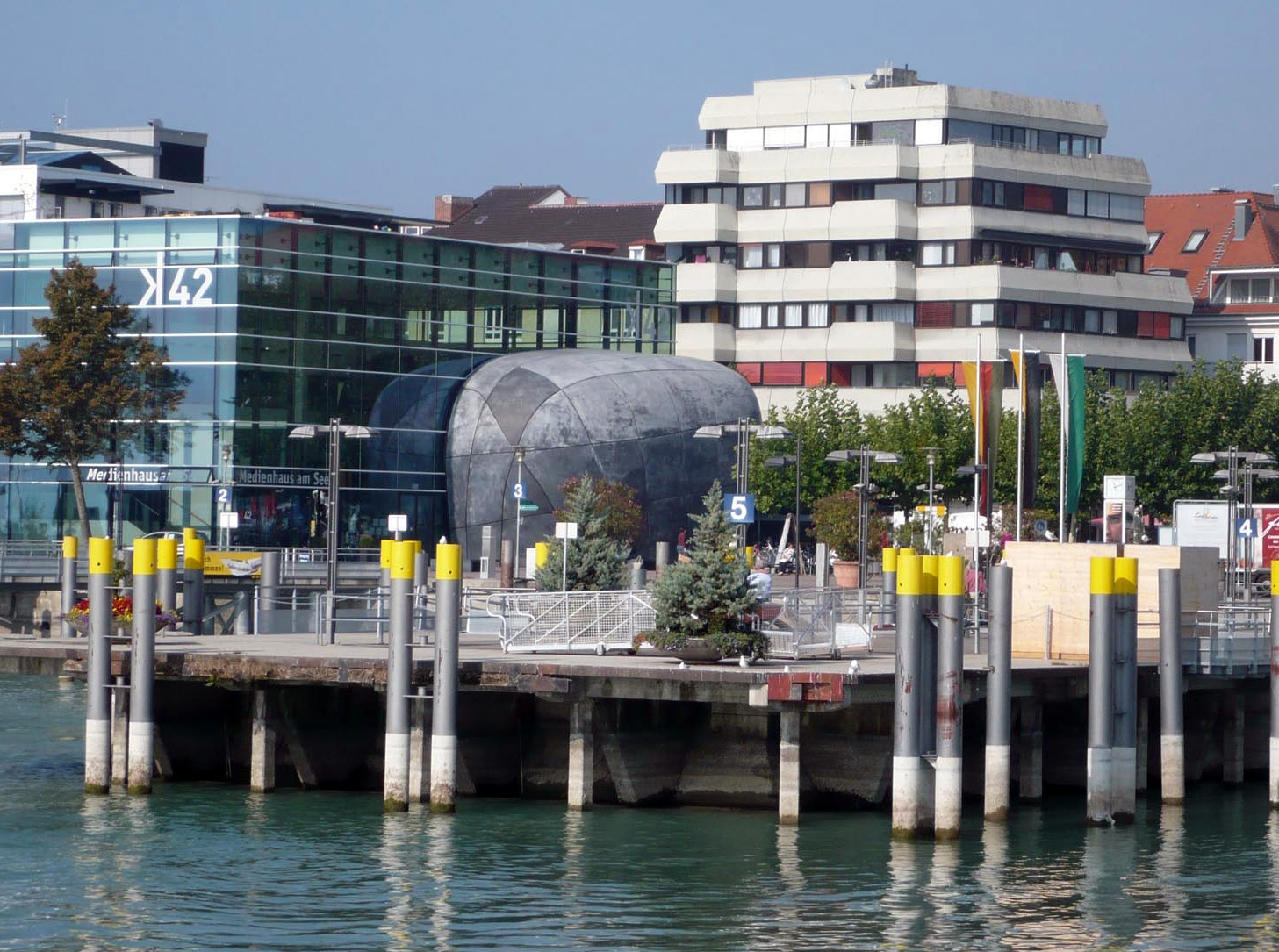 Blick vom Bodensee aus auf das Medienhaus k42 und den Kiesel